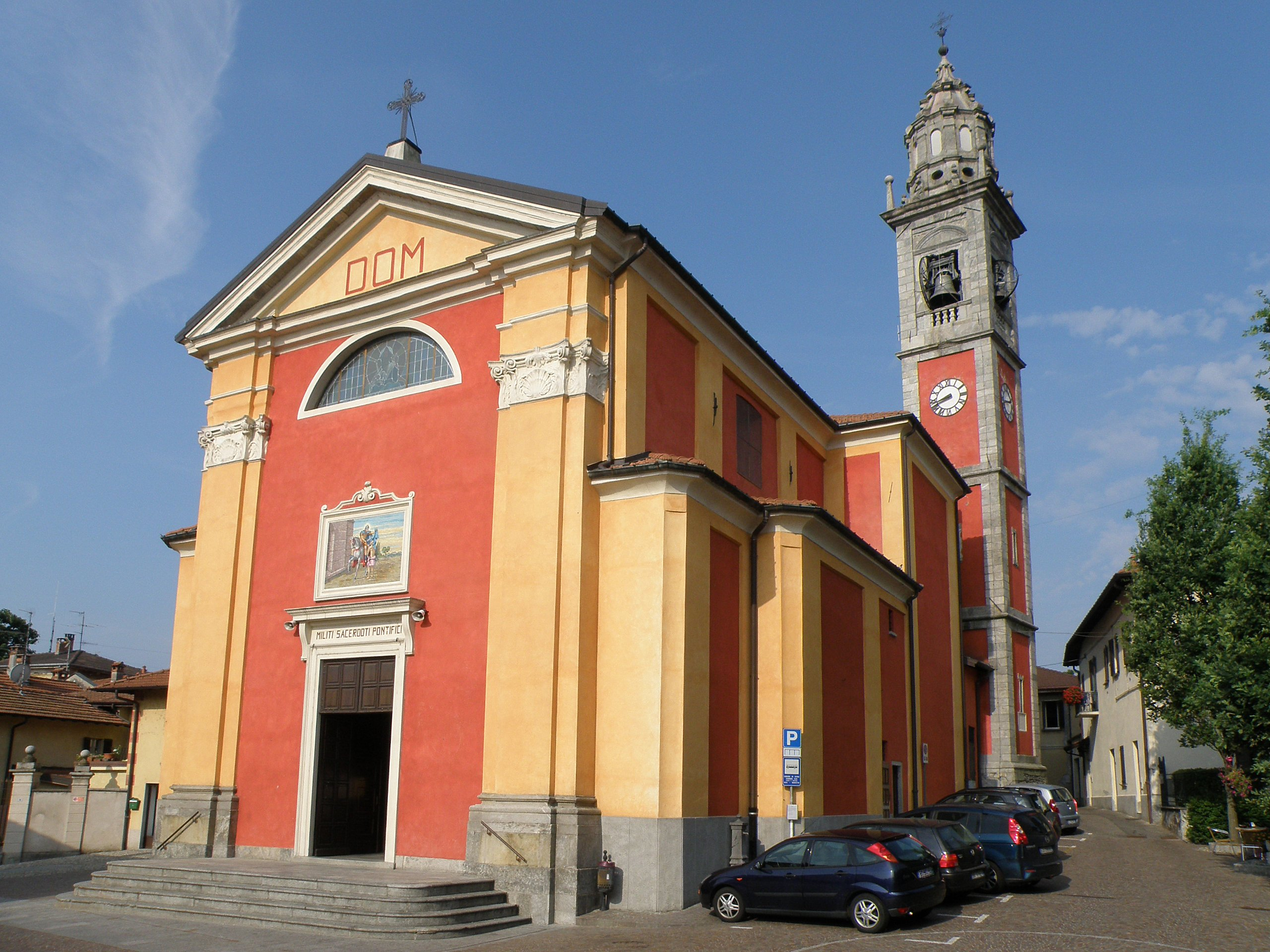 Ispra (VA). Chiesa parrocchiale di San Martino Vescovo.